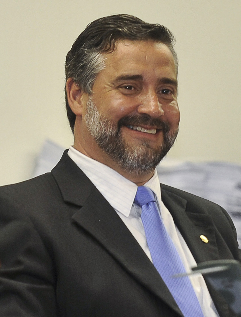 Paulo Pimenta, presidente da Comissão Mista de Orçamento (CMO) do Congresso Nacional aprova parecer preliminar do Orçamento de 2013